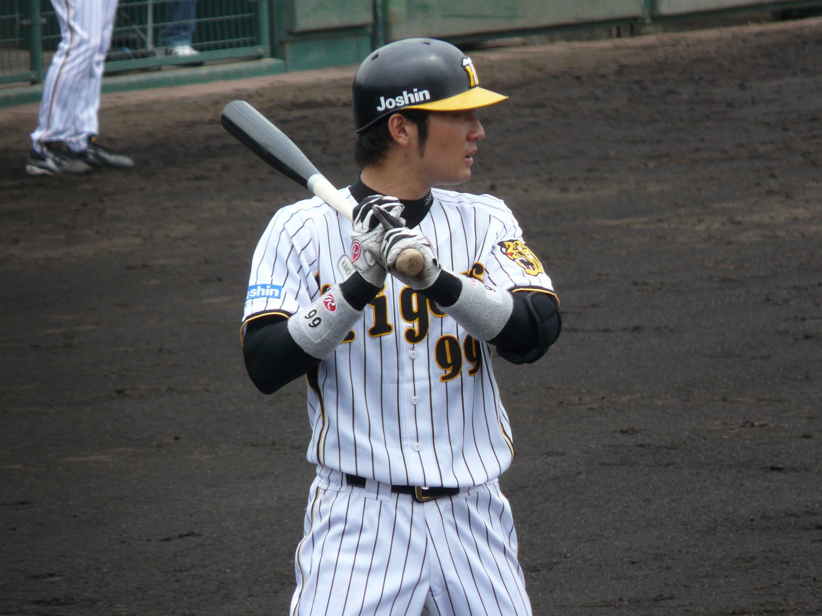 Copied from 画像:HT-Keisuke-Kano-1.jpg: "狩野恵輔"